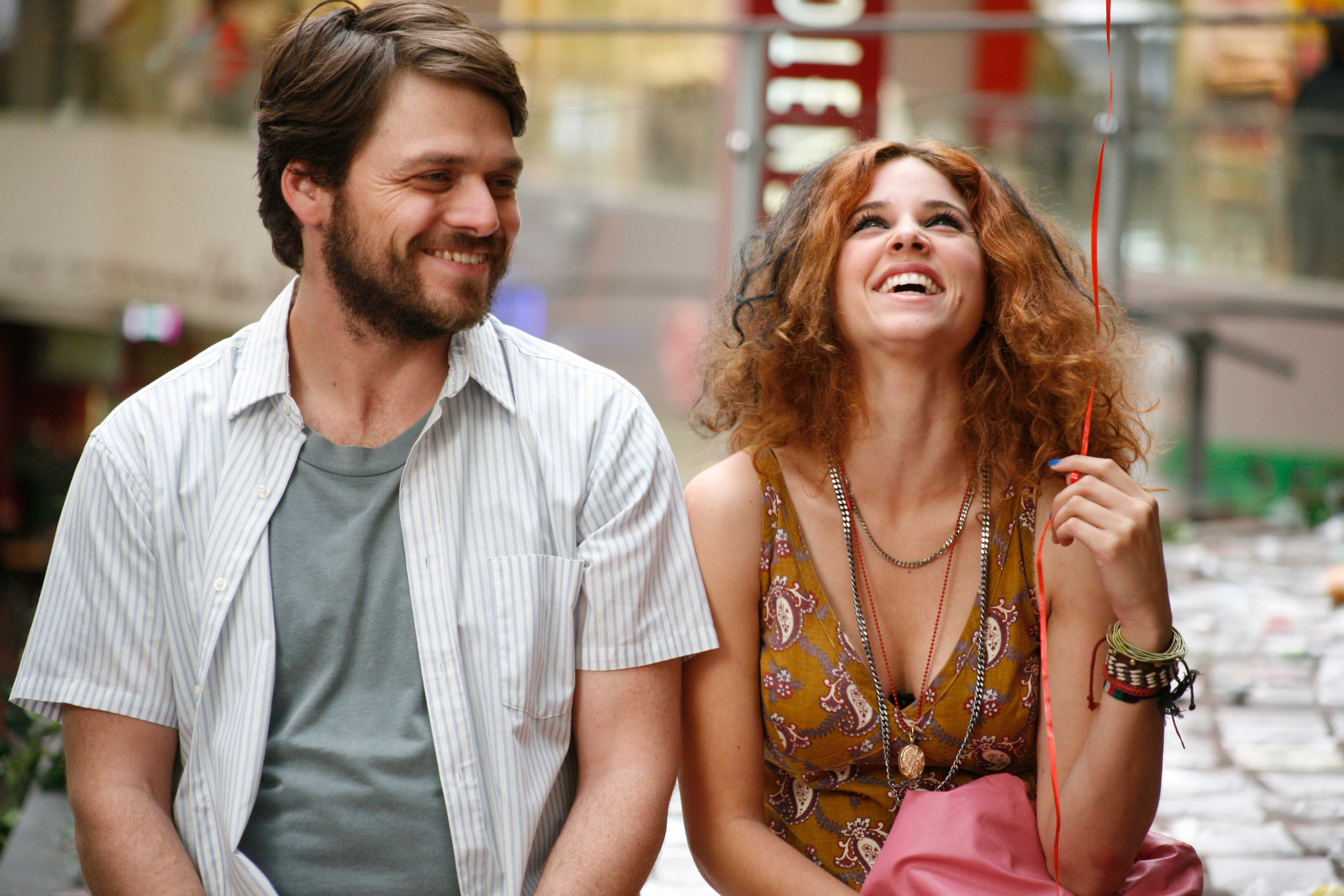 אפרת בן יעקב ואוהד קנולר בסרט "אנחנו לא לבד"